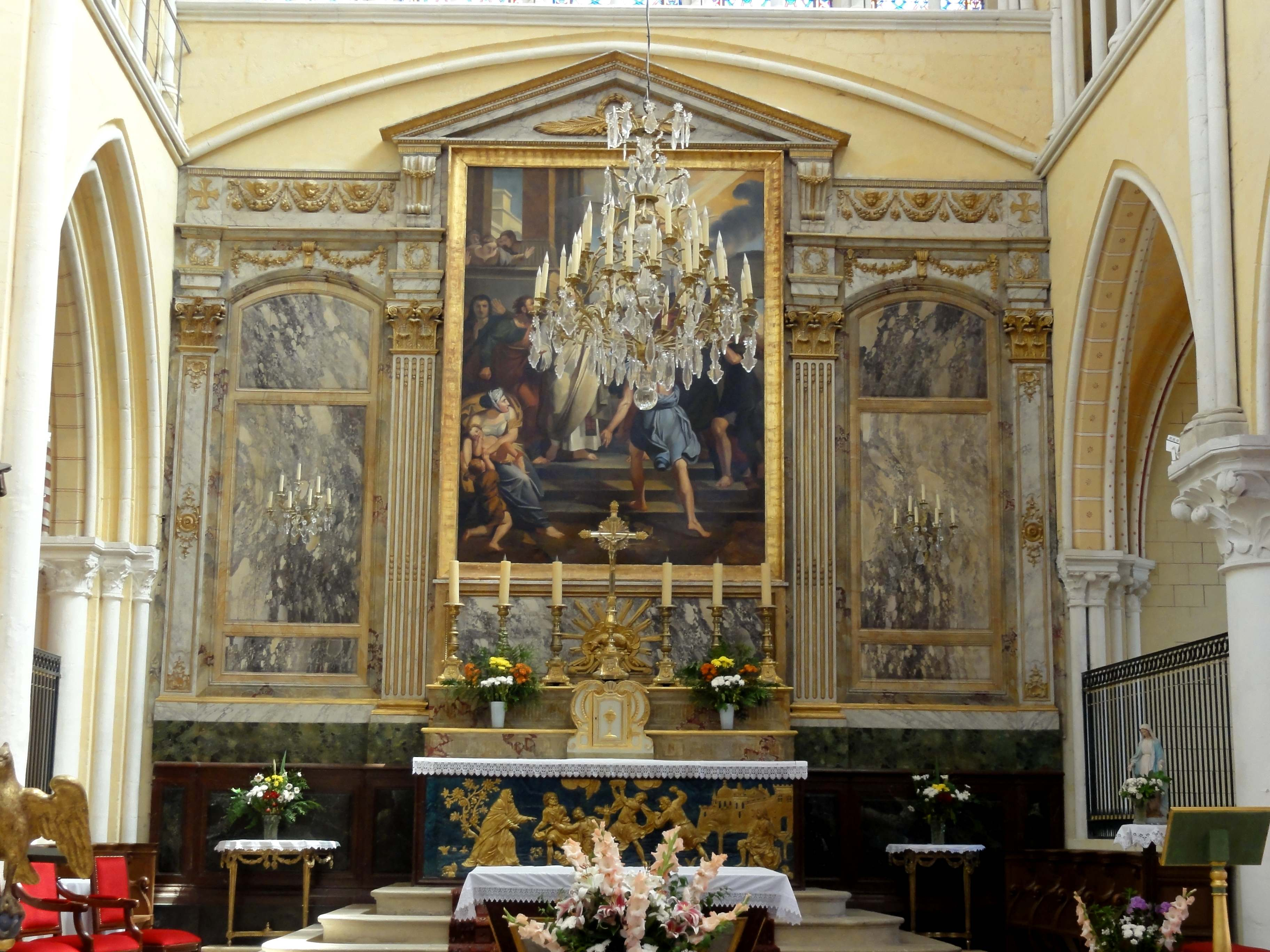 Retable du maître-autel.